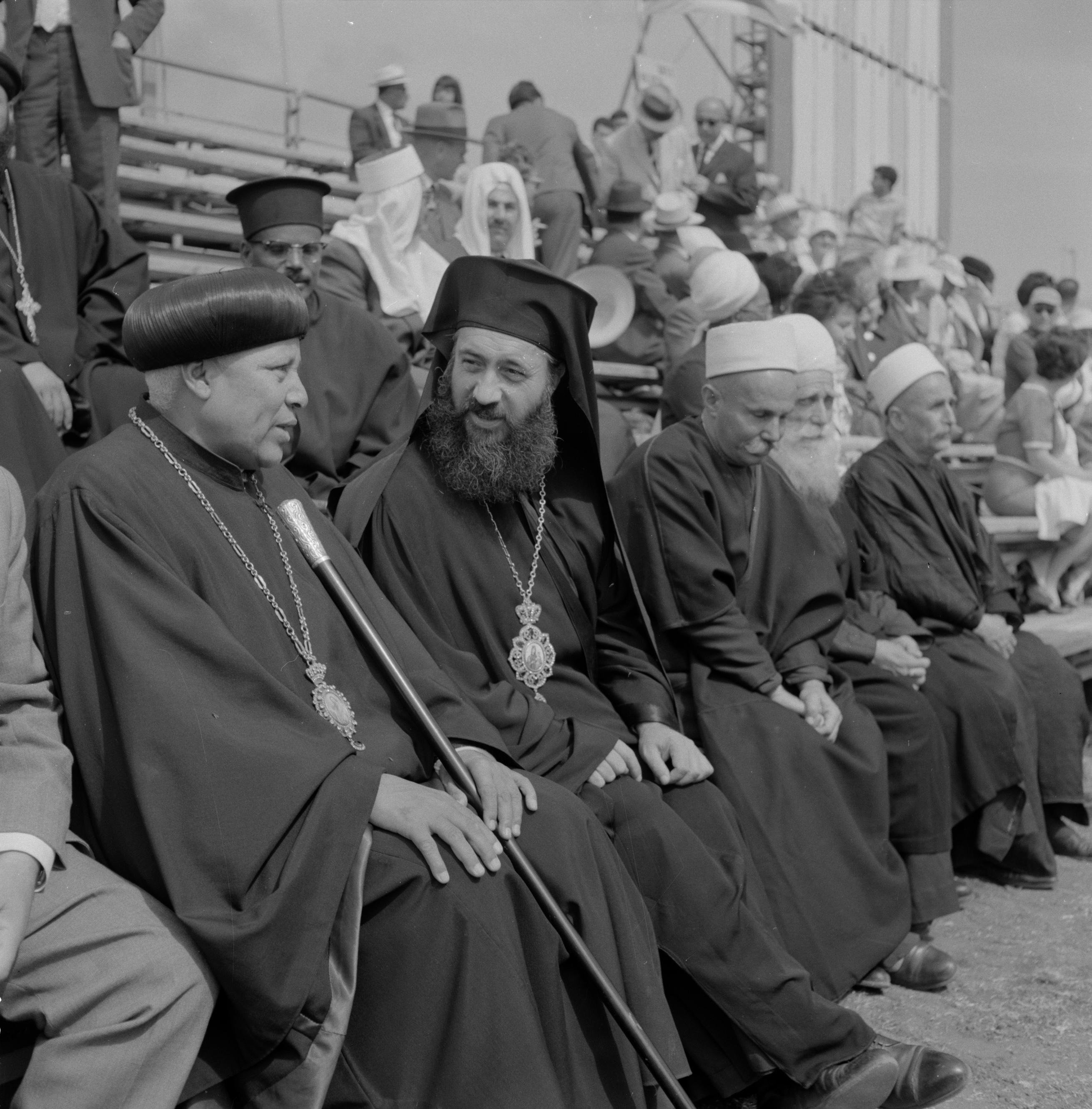 Collectie / Archief : Fotocollectie Van de Poll Reportage / Serie : [ onbekend ] Beschrijving : Onafhankelijkheidsdag (15 mei). Christelijke en druzische geestelijken als toeschouwers bij een militaire parade Locatie : Israël Trefwoorden : christendom, geestelijken, militaire parades, nationale feestdagen Instellingsnaam : Onafhankelijkheidsdag Fotograaf : Poll, Willem van de, [onbekend] Auteursrechthebbende : Nationaal Archief Materiaalsoort : Negatief (zwart/wit) Nummer archiefinventaris : bekijk toegang 2.24.14.02 Bestanddeelnummer : 255-4654